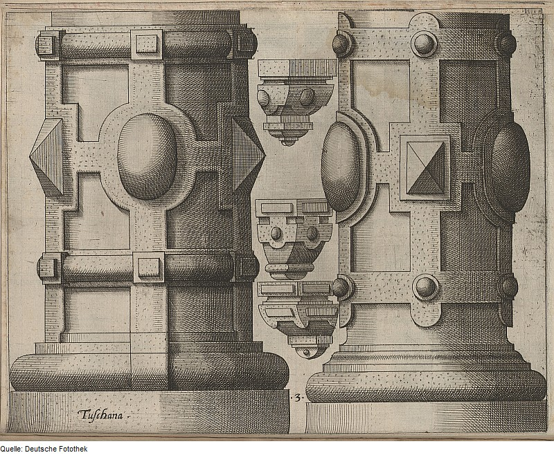 Original image description from the Deutsche Fotothek Architektur & Bauelement & Ornament & Torus & Basis